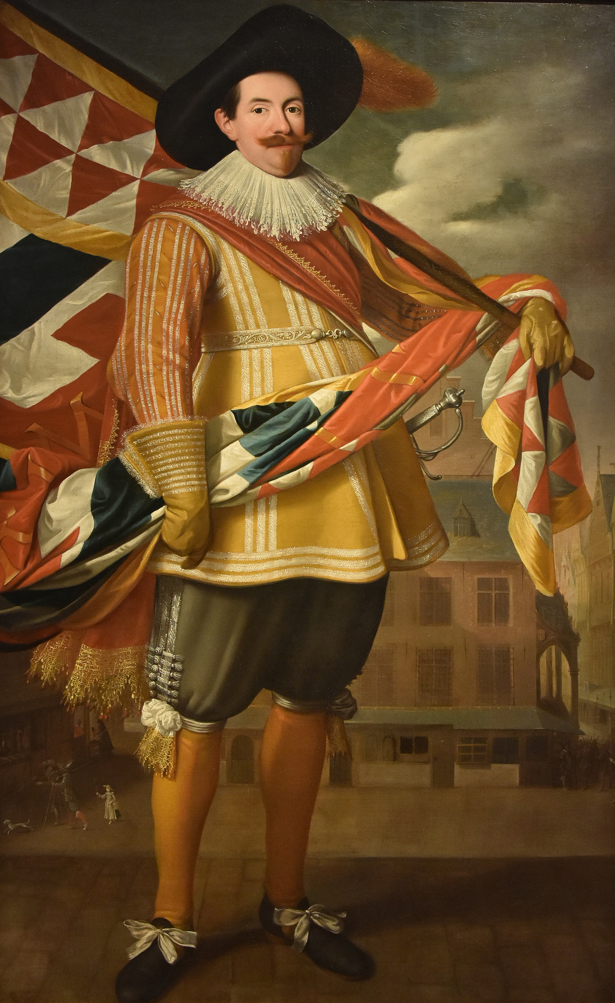 Jan Verhoeven (1600-1676) Rombout Heyns in 1580 voor het Schepenhuis, vaandeldrager van de kolveniersgilde van Mechelen - Museum Hof van Busleyden Mechelen This photo of movable heritage has been taken in the Flemish Region